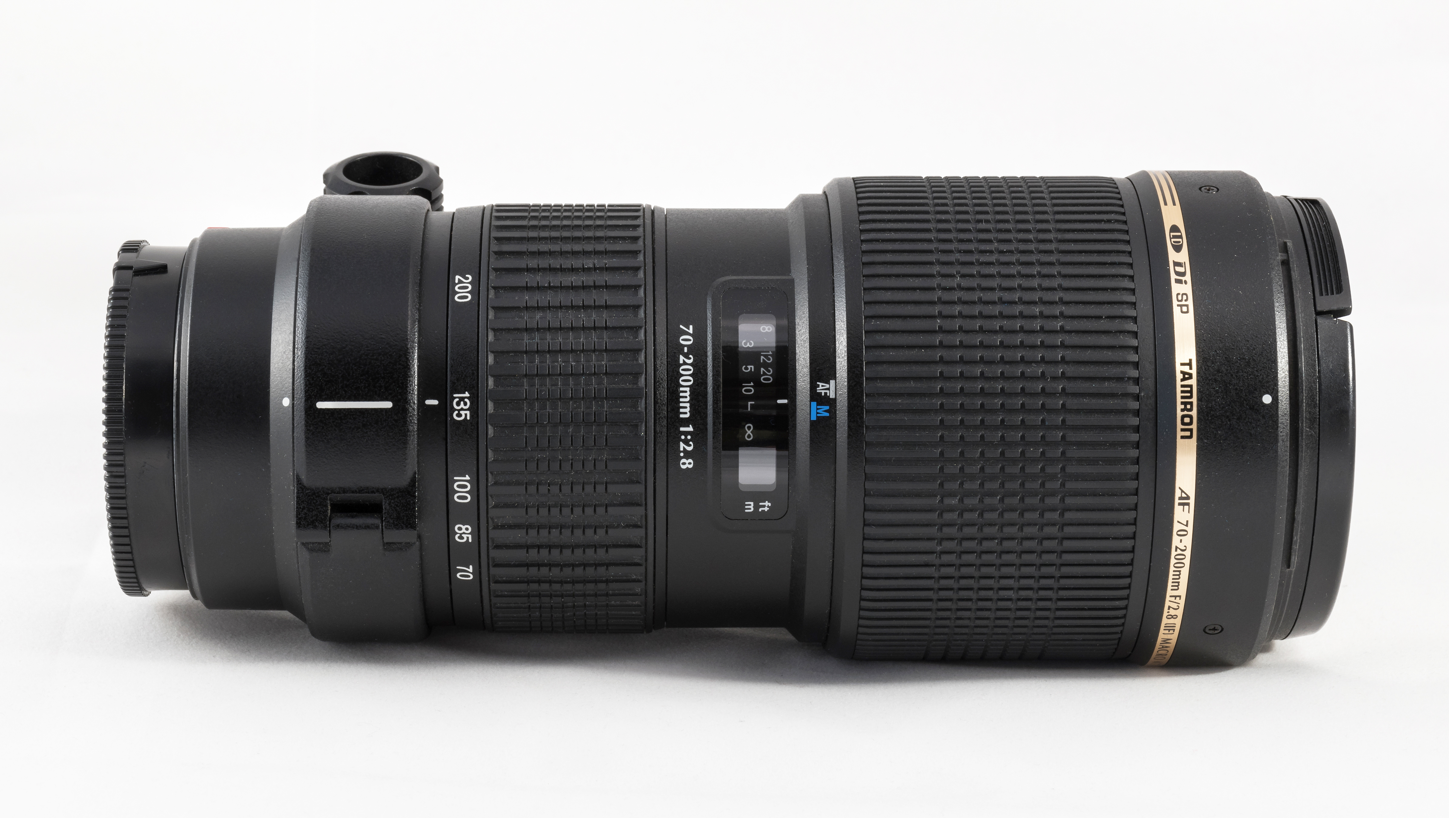 Tamron SP AF 70-200mm F/2.8 Di VC USD